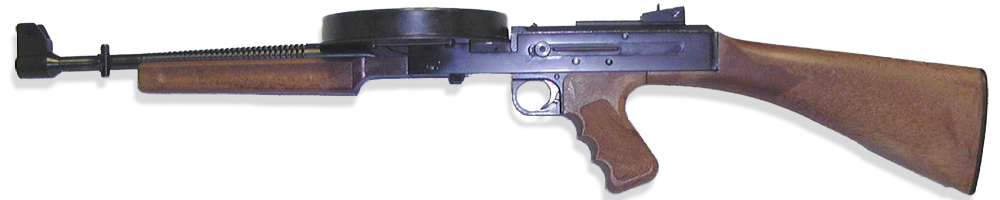 Súng tiểu liên American-180